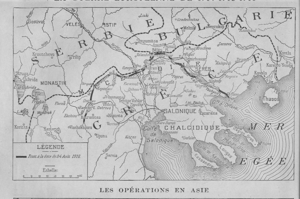 Carte des avancées Alliées à la date du 24 août 1916 publiée par le Pays de France.